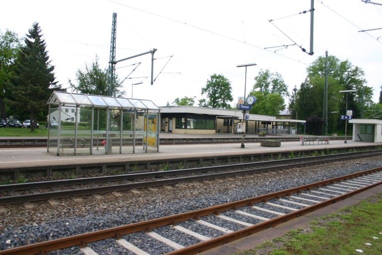 Bahnhof Pleinfeld